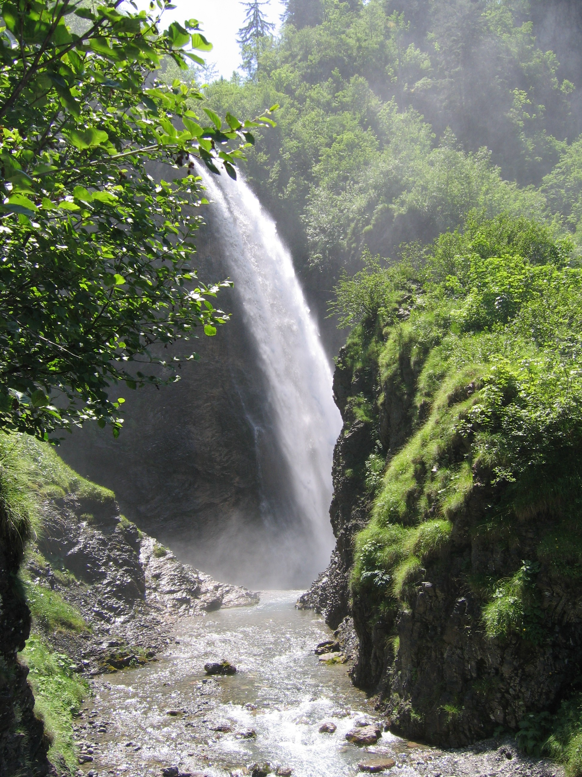 Stuibenwasserfall bei Oberstdorf im Qytal in der Nähe der Käseralpe